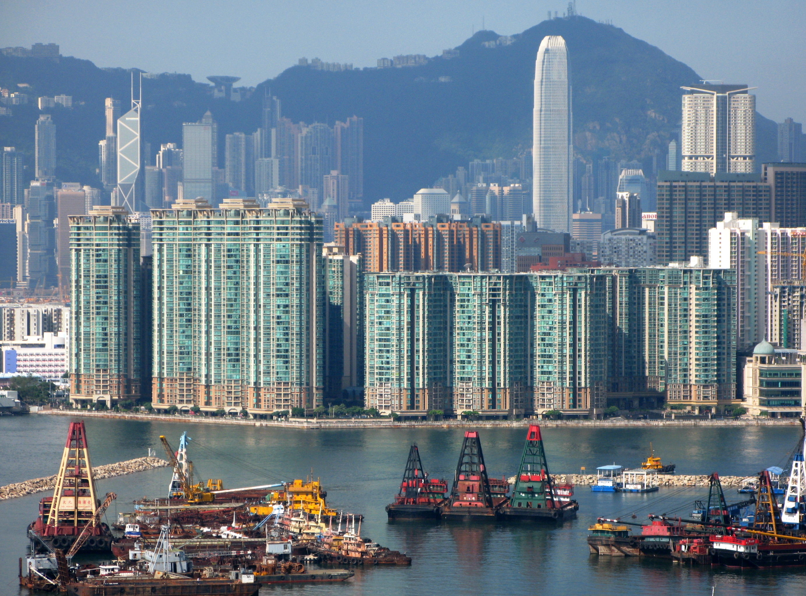 Laguna Verde